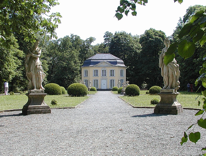 Schloss Burgk: der Pavillon Sophienlust